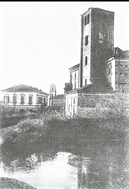 La peschiera di Ceresole d'Alba (foto d'epoca)